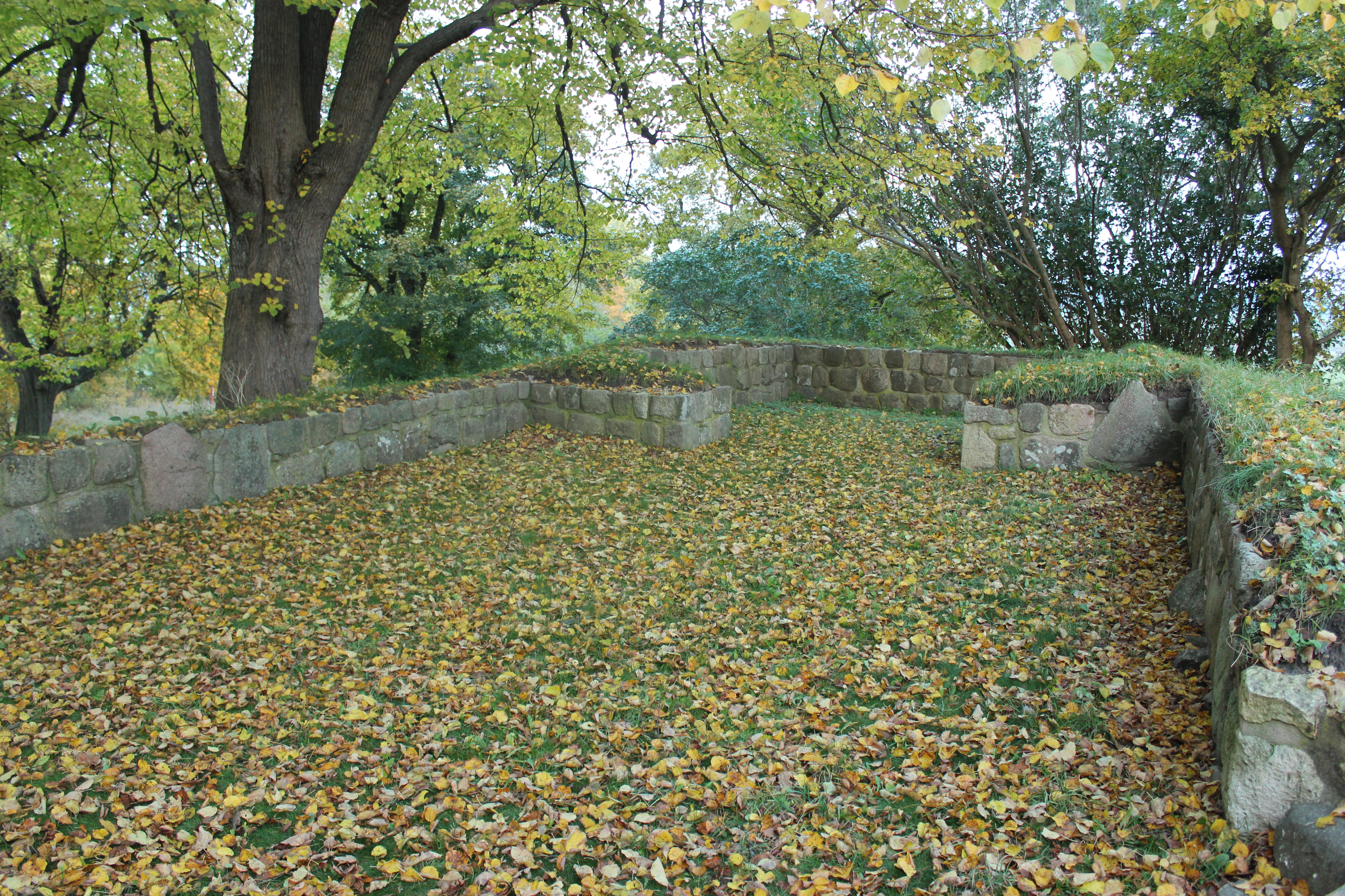 Kirkerummet